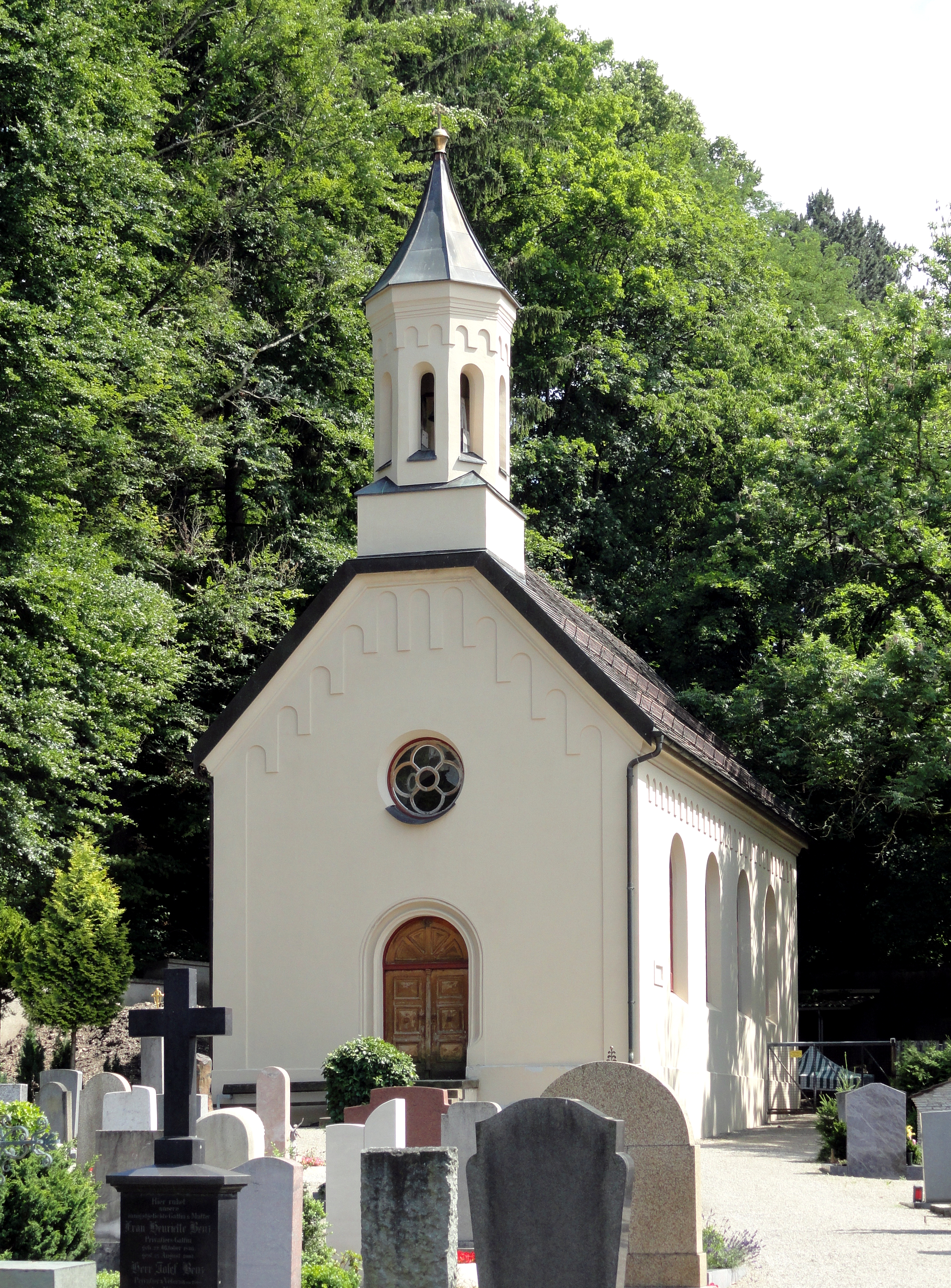 Evangelischer Friedhof Kempten - Friedhofskapelle, Ausgrabungen dahinter sowie Grabstellen einiger "Promis"